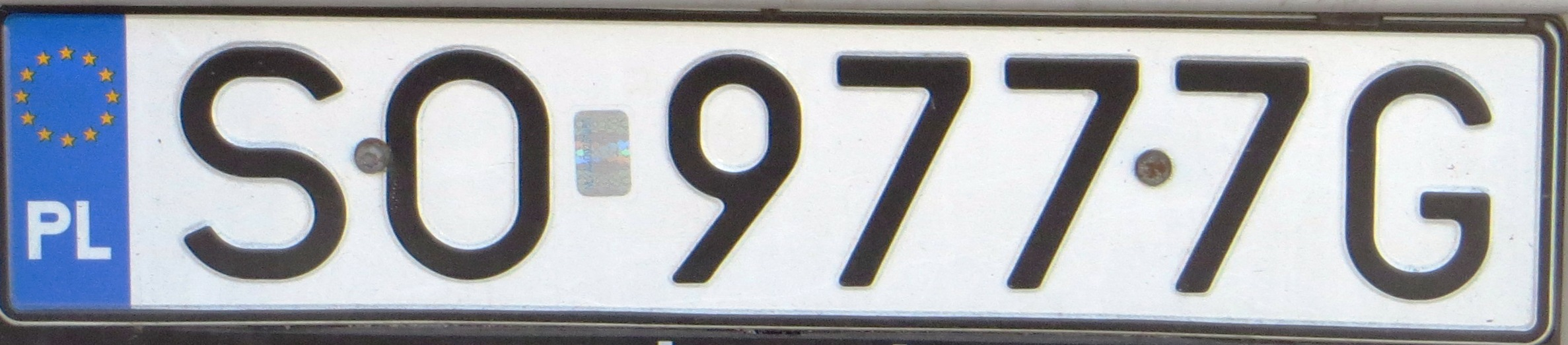 Poolse EU plate